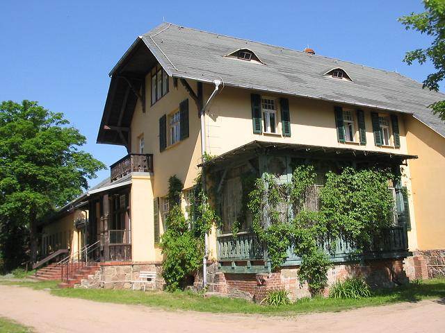 Kloster/Stift Marienfließ, Prignitz, Brandenburg. Speisesaal des Stifts.